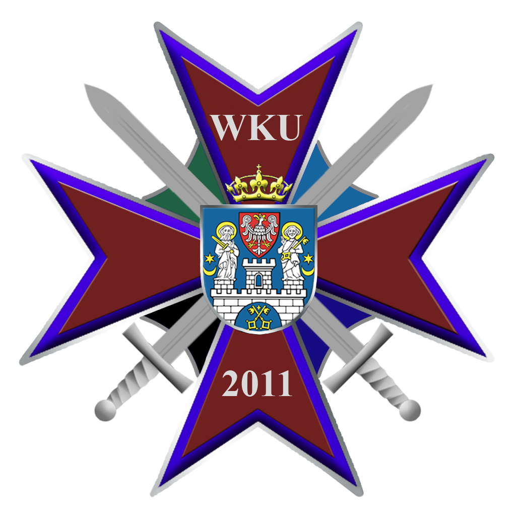 Odznaka Wojskowej Komendy Uzupełnień w Poznaniu